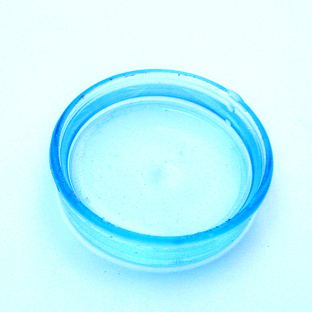 Меновазин налитый в чашечку размером с 5-ти копеечную монету. Фото А. Щекинова